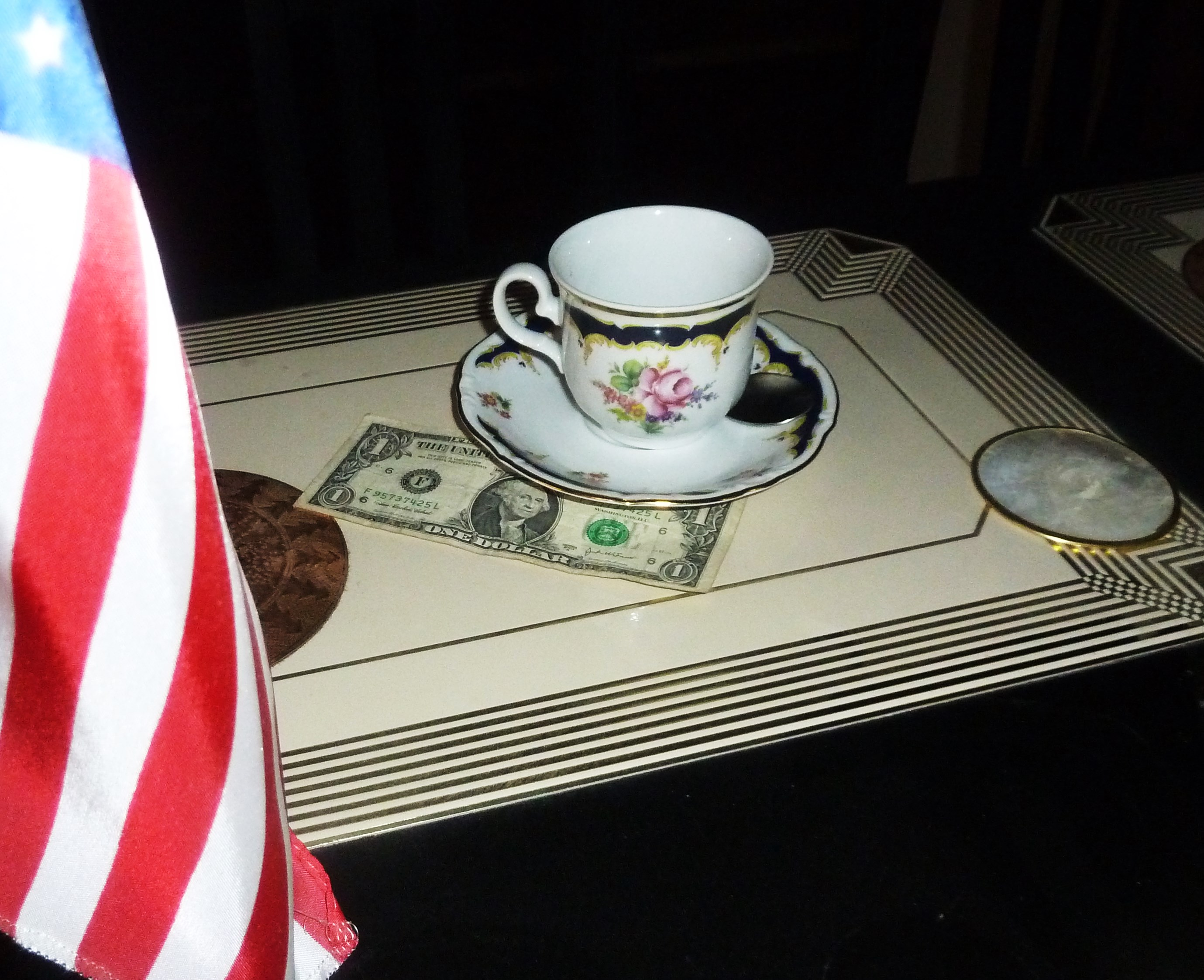 Trinkgeld